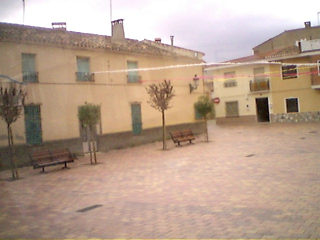 PozoLorenteAlb